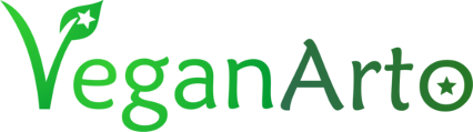 Logo de la web en esperanto sobre veganismo, VeganArto.